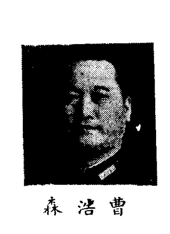 中文（中国大陆）: 制憲國民大會代表